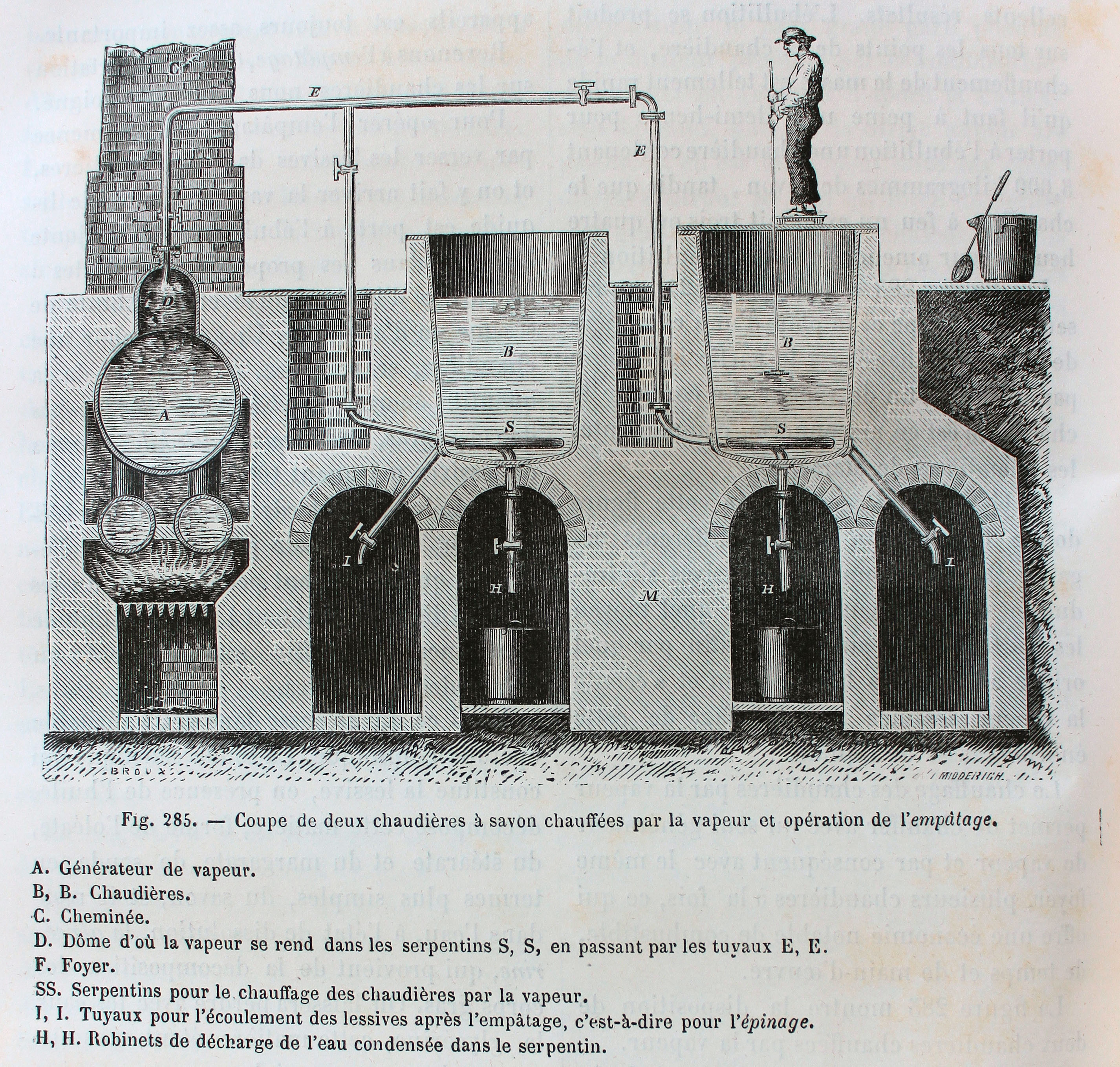 Ilustraciones de la obra : Les merveilles de l'industrie ou, Description des principales industries modernes / par Louis Figuier. - Paris : Furne, Jouvet, [1873-1877]. - Tome I